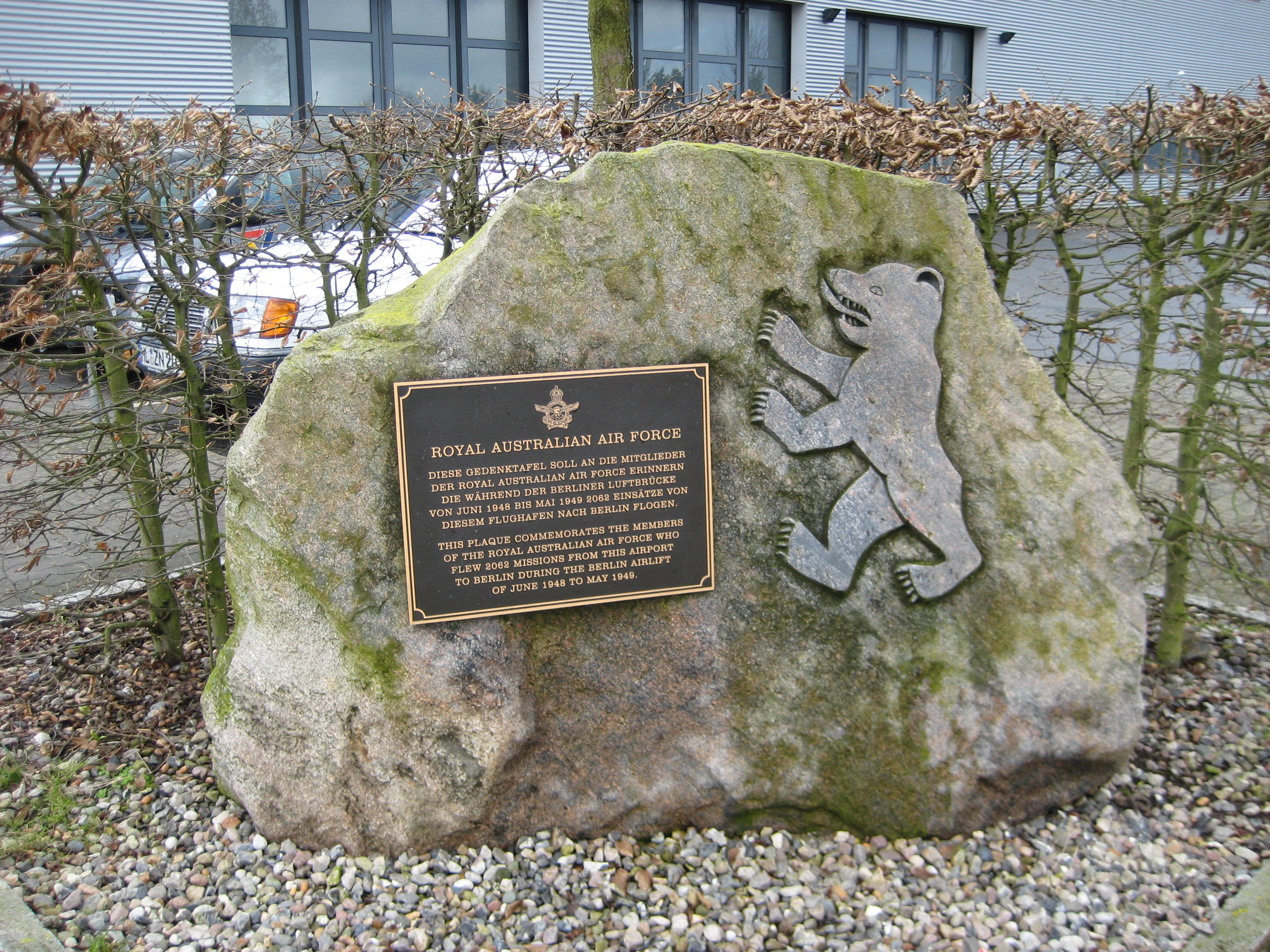 Gedenkstein am Flughafen Lübeck zur Erinnerung an die Piloten der Australischen Royal Air Force, die von hier die Berliner Luftbrücke bildeten